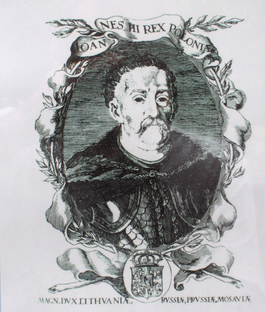 King Jan III Sobieski of Poland